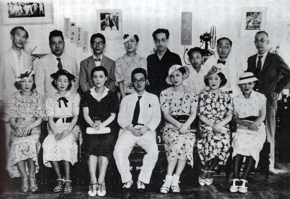 松竹少女歌劇団の出演者とスタッフ 後列左から青山杉作（演出）、山口松三郎（照明）、三宅元治（声楽）、富士峯子、青山圭男（振付）、某、佐藤清吉（楽長）、山崎俊夫（業務）。前列左から小倉みね子、小野小夜子、オリエ津阪、三村亮太郎（美術）、水の江瀧子、市村菊子（日舞）、青菜笙子。